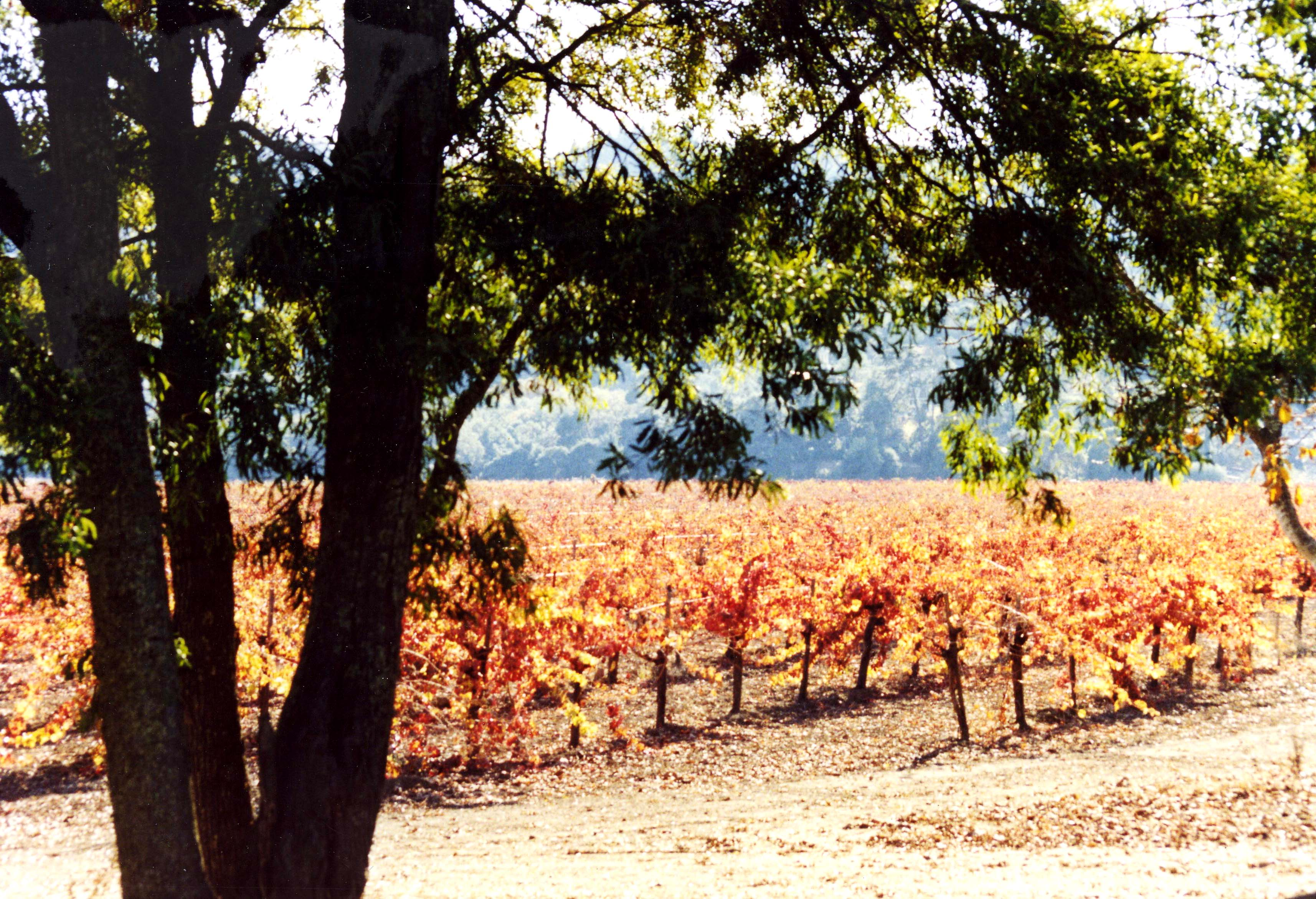 California, Usa, wine, 1990